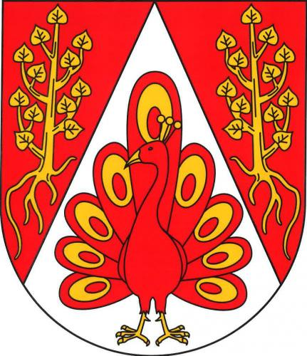 Jičíněves, znak obce